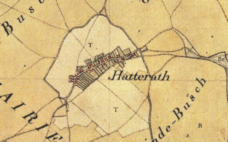 Kartenaufnahme der Rheinlande 1803-1820